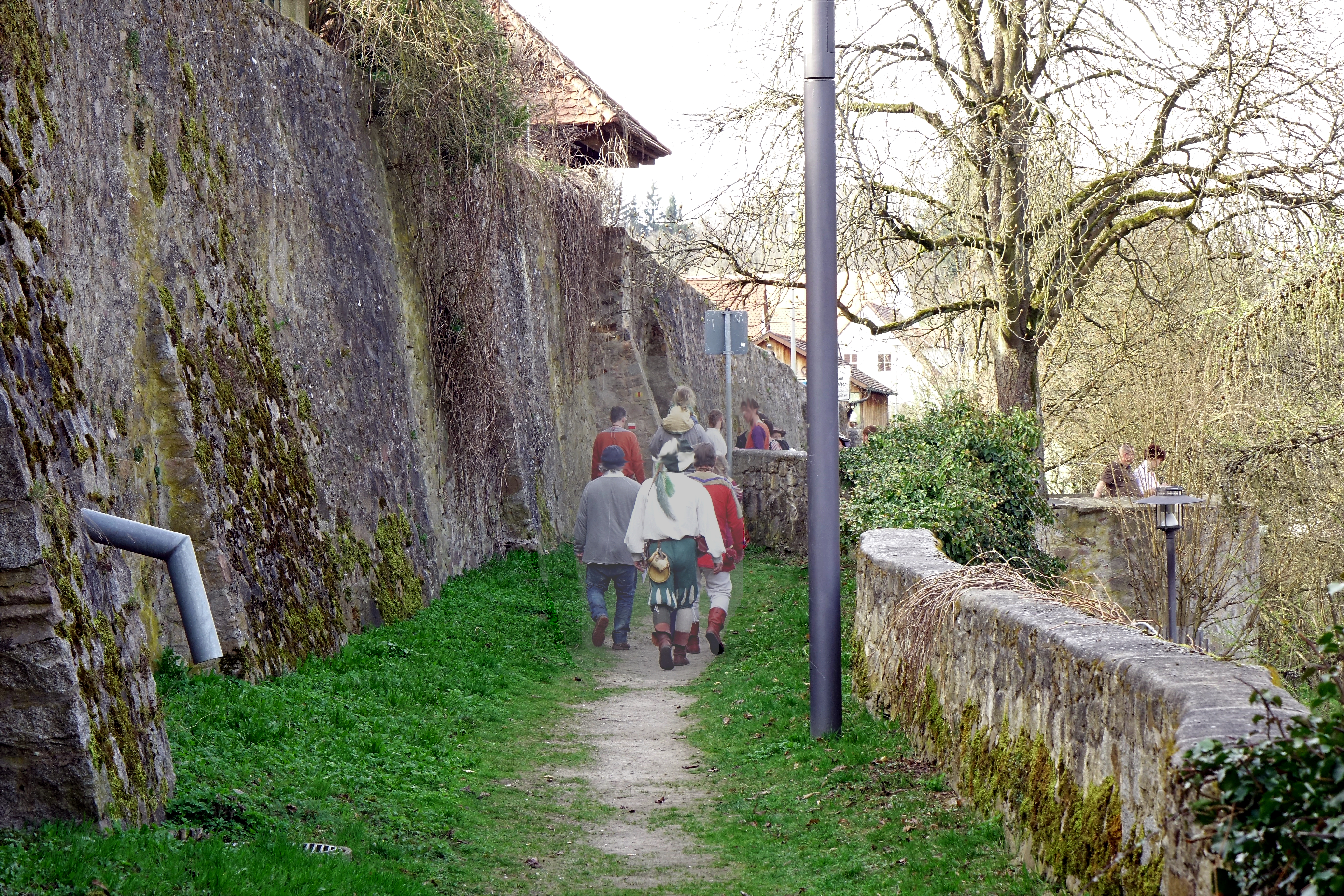 Ostseite Burgberg Nabburg Gehweg mit Felswand Objektnr. 376A030